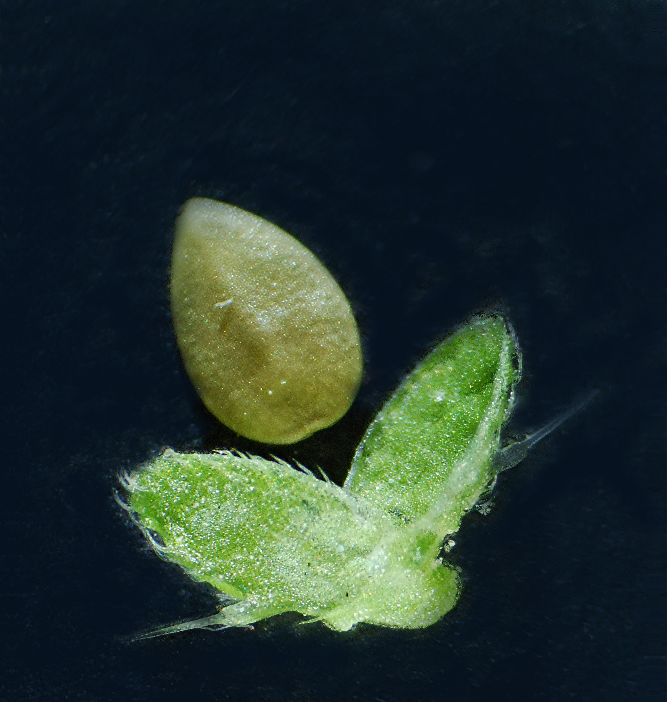 Urtica dioica, grande ortie, fruit